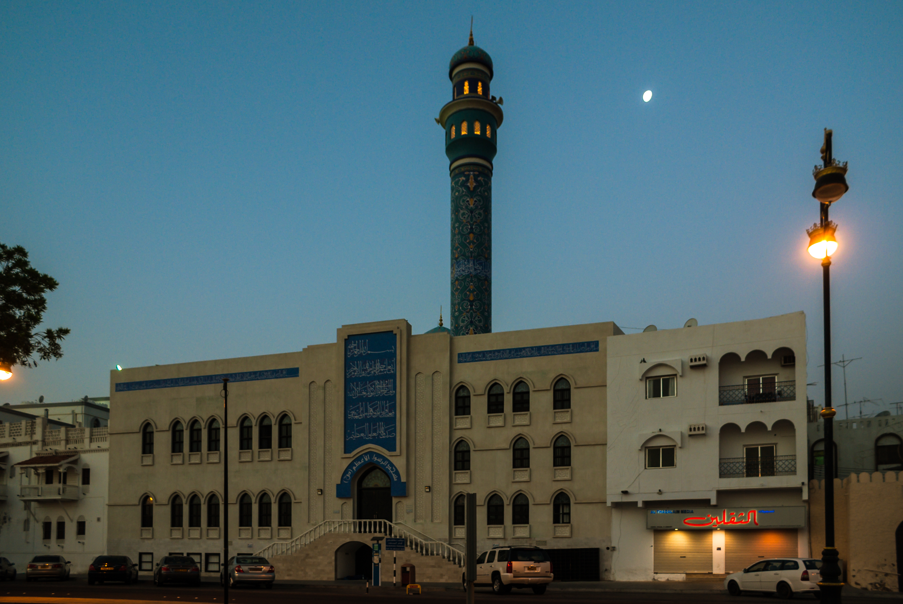 Mosque in Mutrah, Oman at dawn